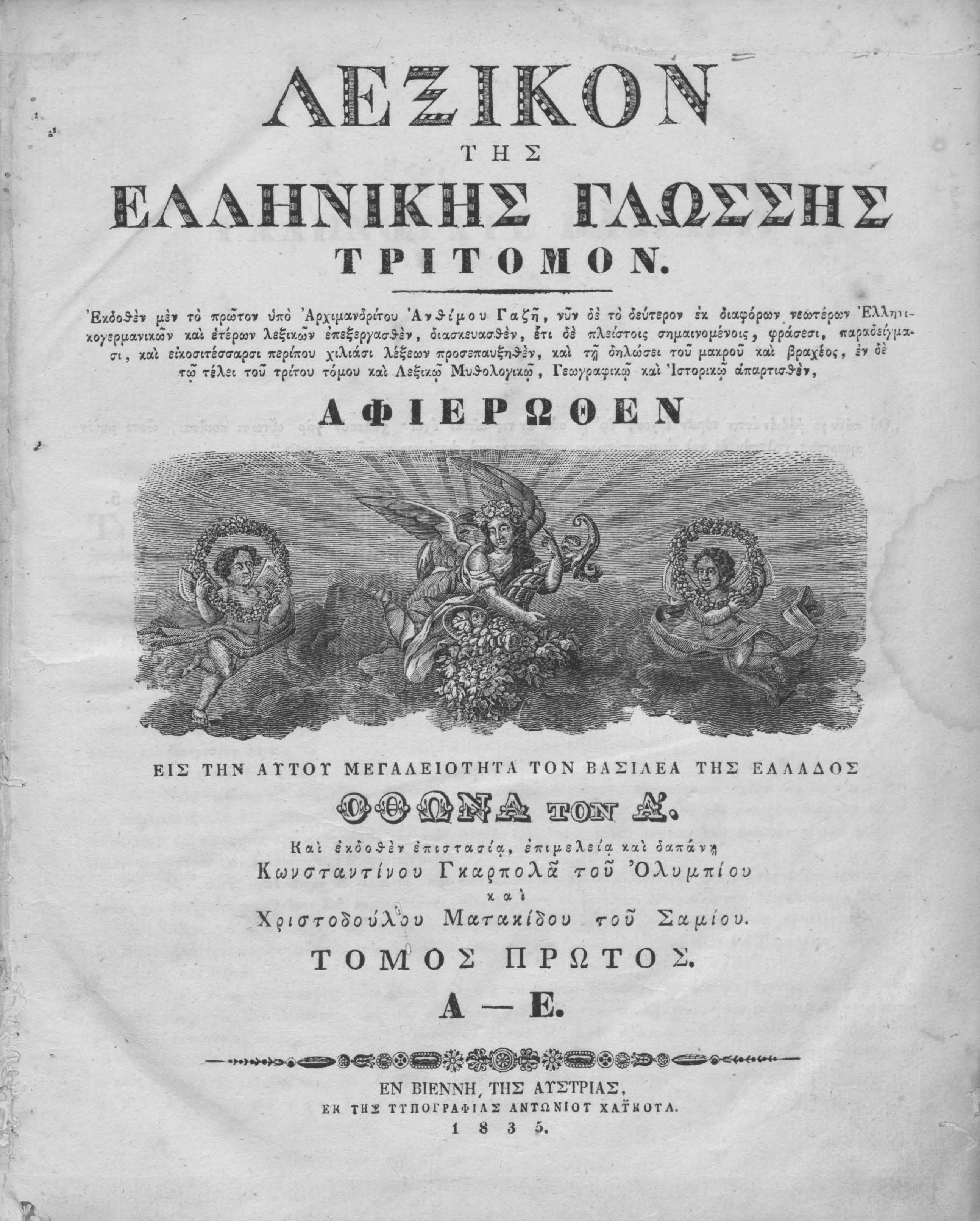 Λεξικόν της Ελληνικής Γλώσσης τρίτομον / Εκδοθέν μεν πρώτον υπό αρχιμανδρίτου Ανθίμου Γαζή, νυν δε το δεύτερον εκ διαφόρων νεωτέρων Ελληνικογερμανικών και ετέρων λεξικών επεξεργασθέν, διασκευασθέν, έτι δε πλείστοις σημαινομένοις, φράσεσι, παραδείγμασι, και εικοσιτέσσαρσι περίπου χιλιάσι λέξεων προσεπαυξηθέν, και τη δηλώσει του μακρού και βραχέος, εν δε τω τέλει του τρίτου τόμου και Λεξικώ Μυθολογικώ, Γεωγραφικώ και Ιστορικώ απαρτισθέν ___ και εκδοθέν επιστασία, επιμελεία και δαπάνη Κωνσταντίνου Γκαρπολά του Ολυμπίου και Χριστοδούλου Ματακίδου του Σαμίου.